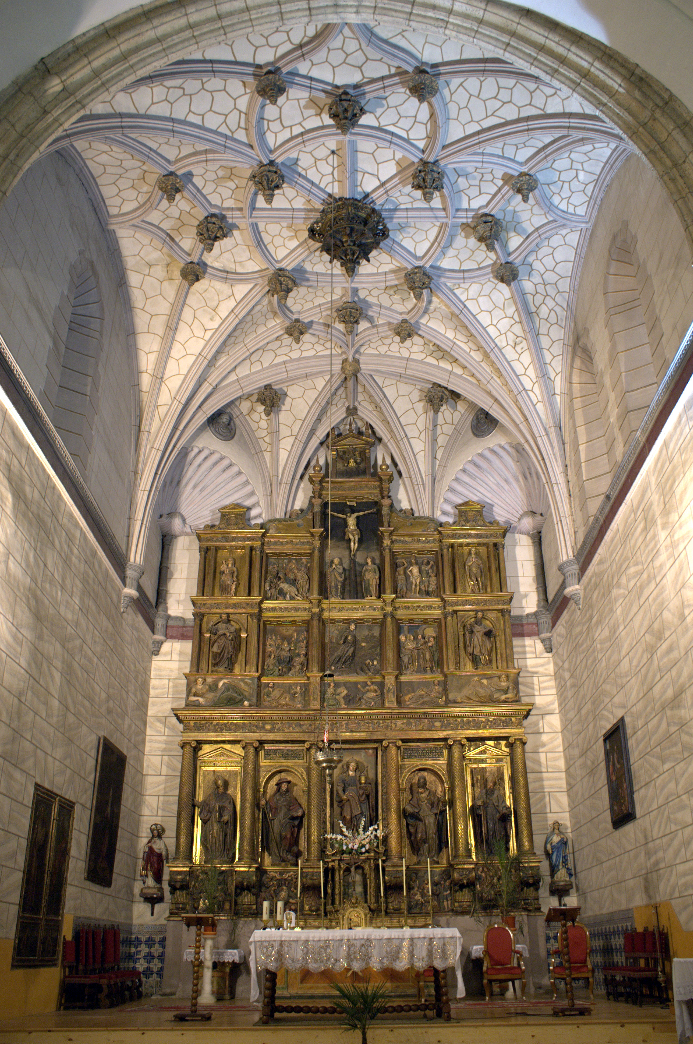 Retablo mayor de la iglesia de Santa María Magdalena de Matapozuelos, Valladolid, España.